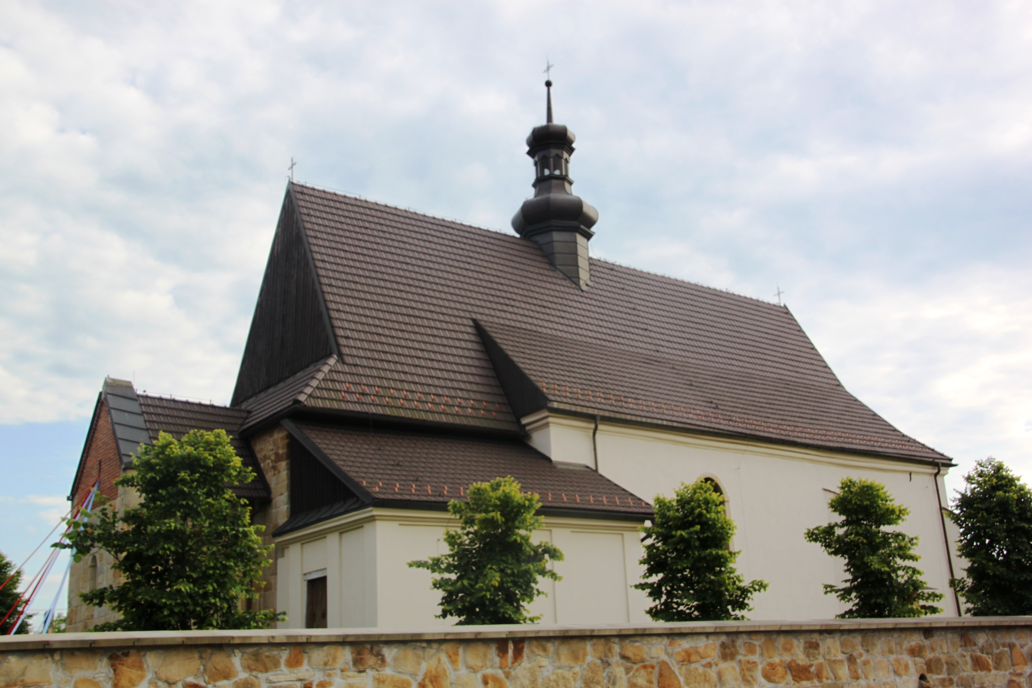 Dziekanowice, zespół kościoła par. p.w. św. Marii Magdaleny, 1226, 1645